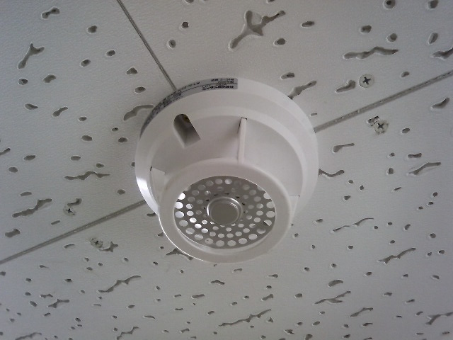 ニッタン製 定温式スポット型熱感知器